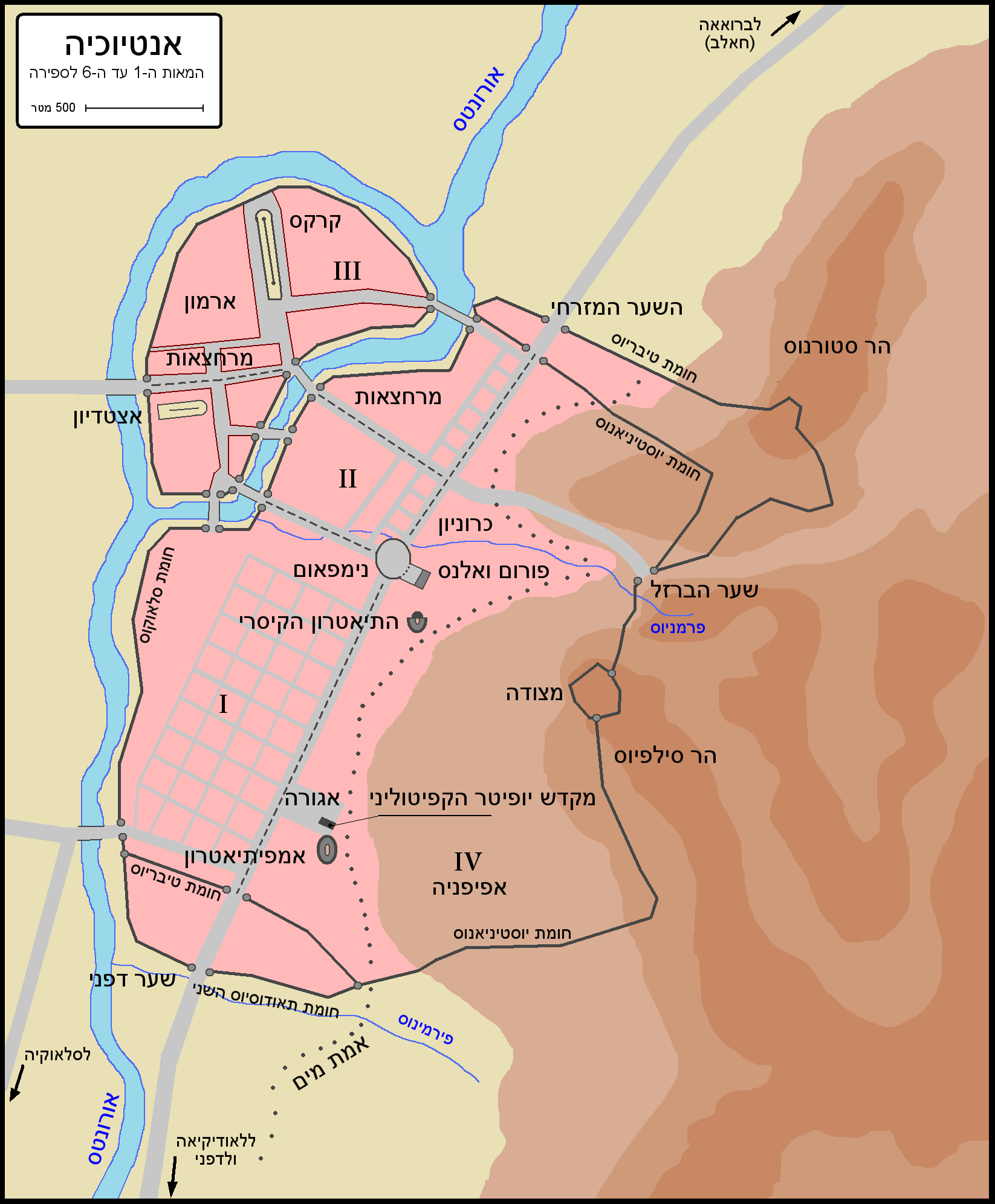 Antiochia, map HEB